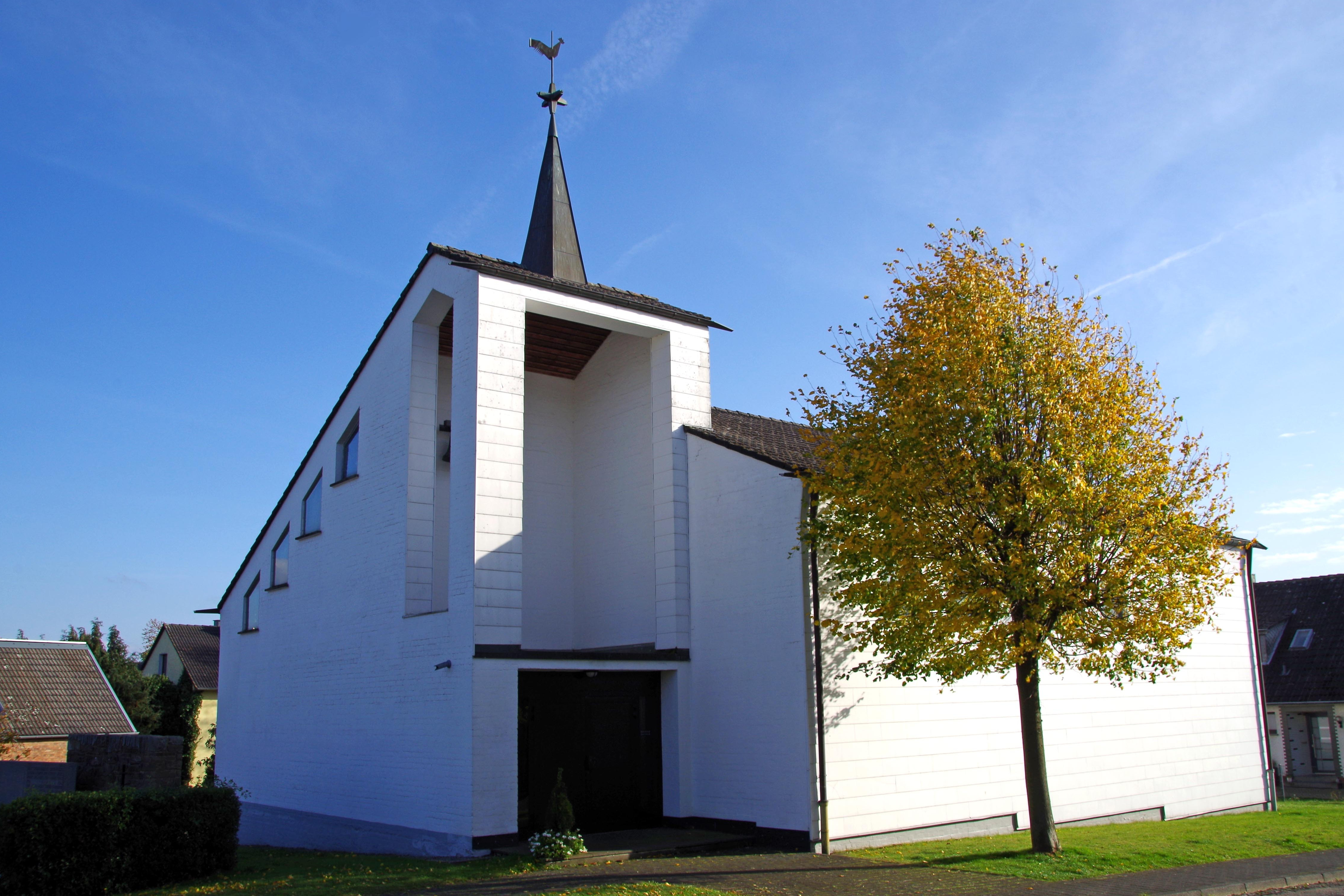 Kapelle Scheuren